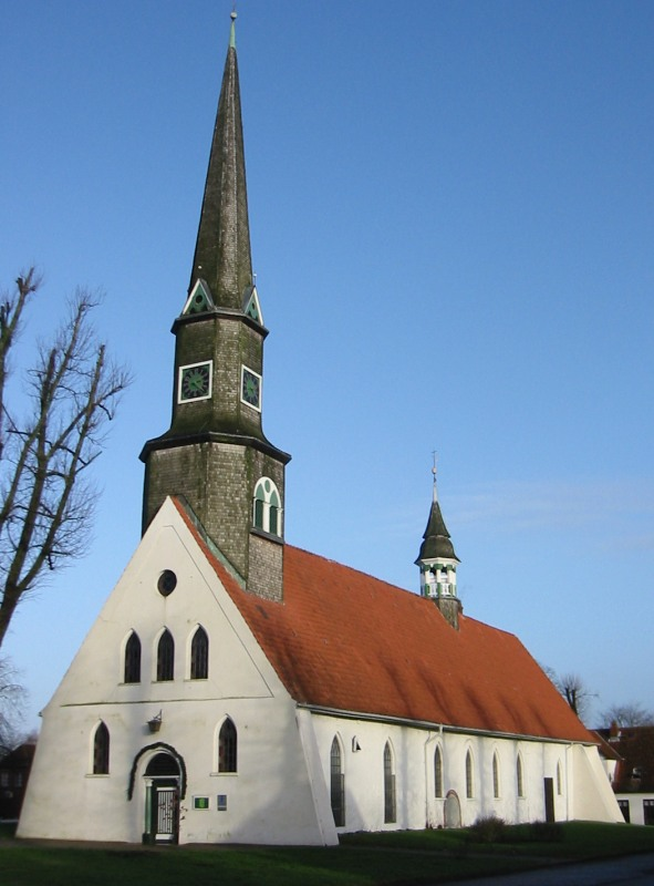 Kirche in D 25779 Hennstedt (Dithmarschen), Feldsteinkirche St. Secundus.